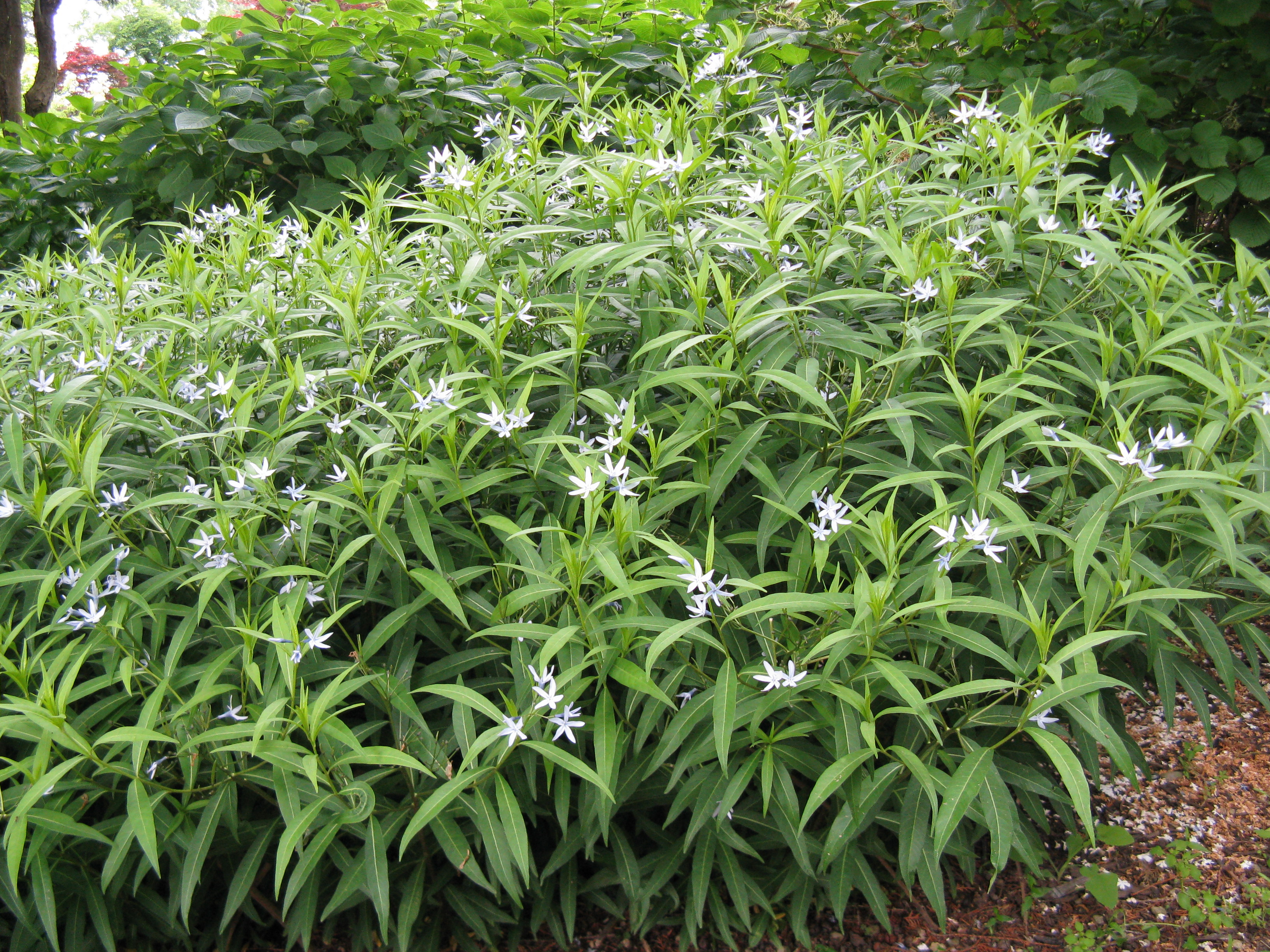 Scientific name Amsonia elliptica